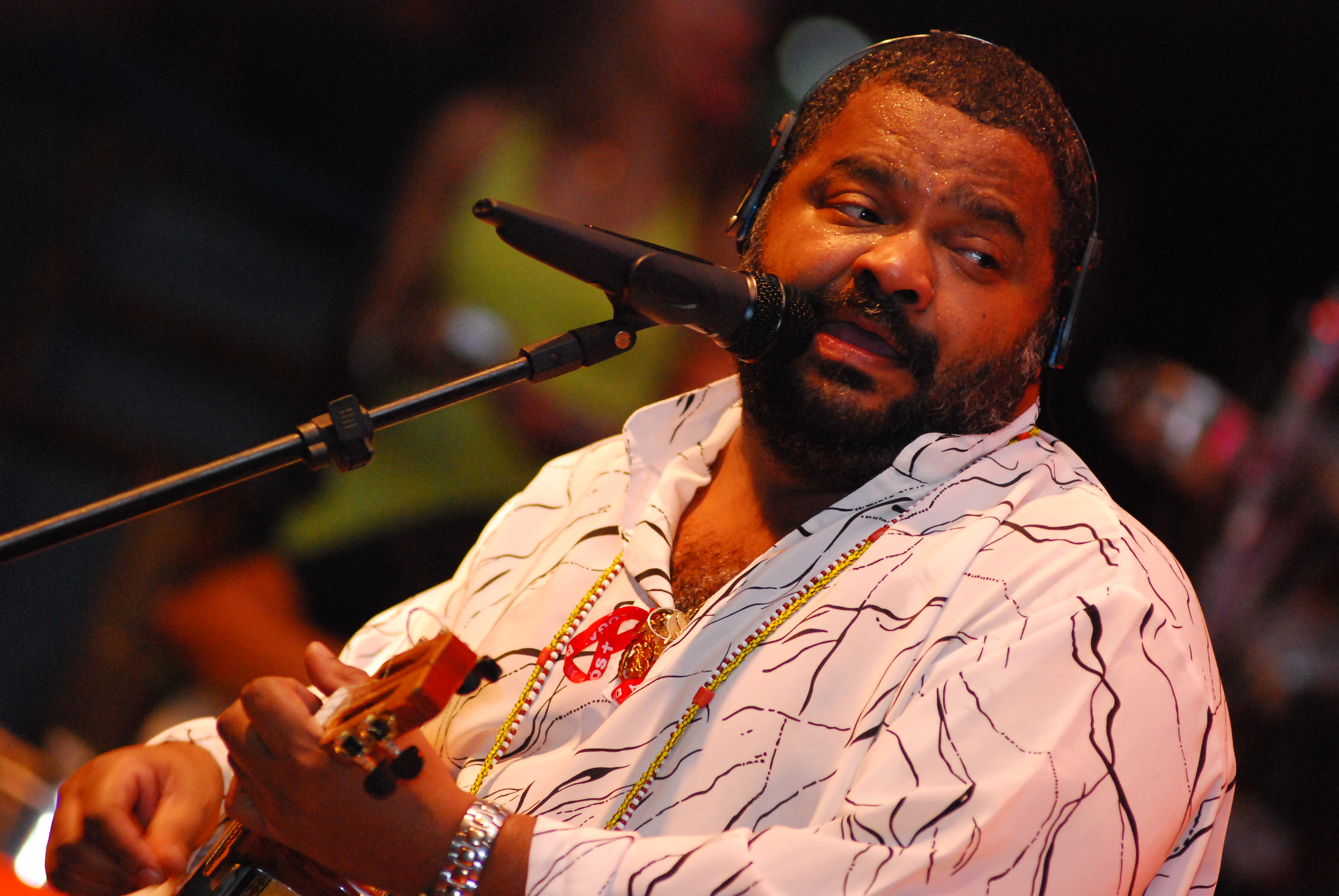 Arlindo Cruz na Virada Cultural em São Paulo, SP em abril de 2008.